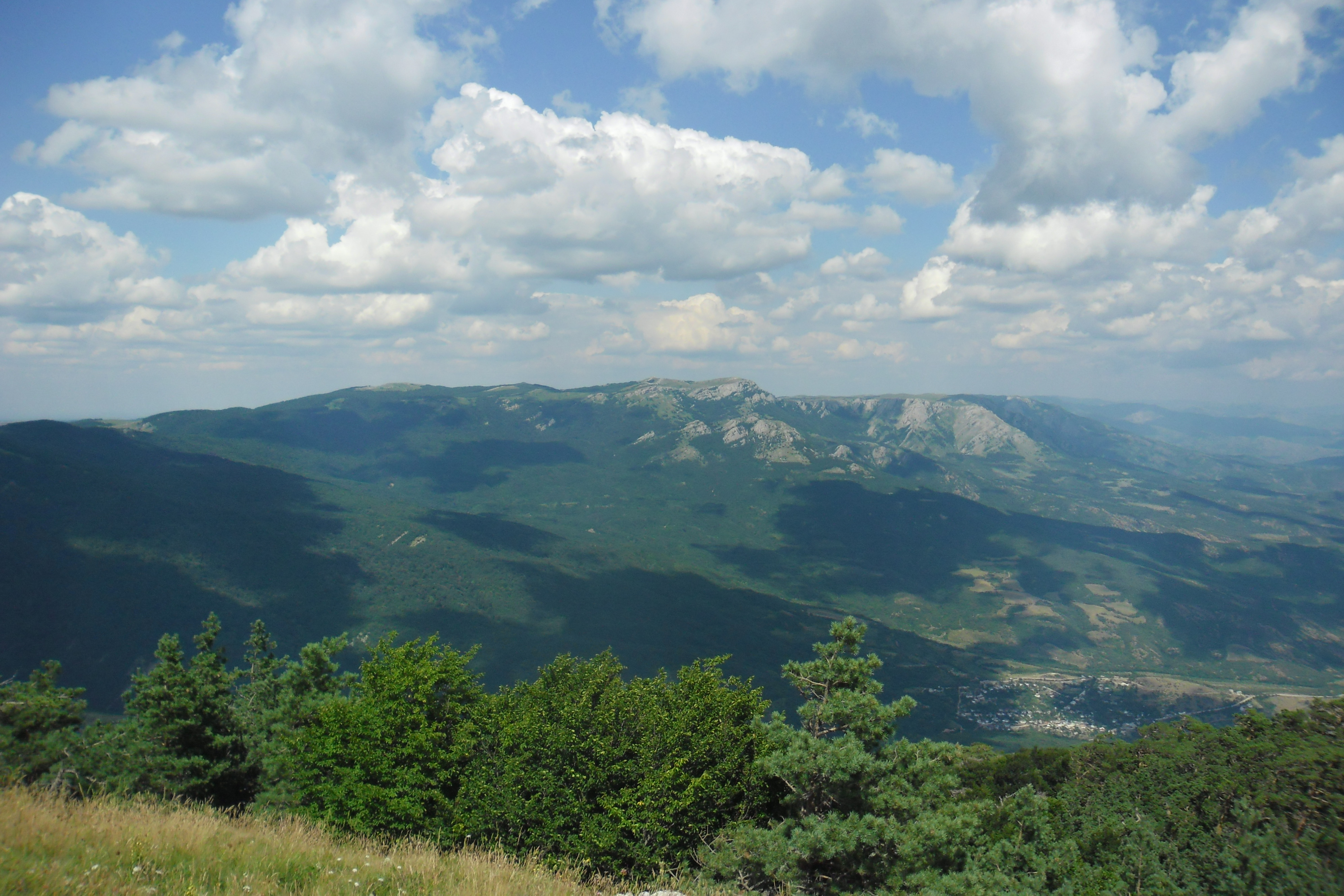 Фото